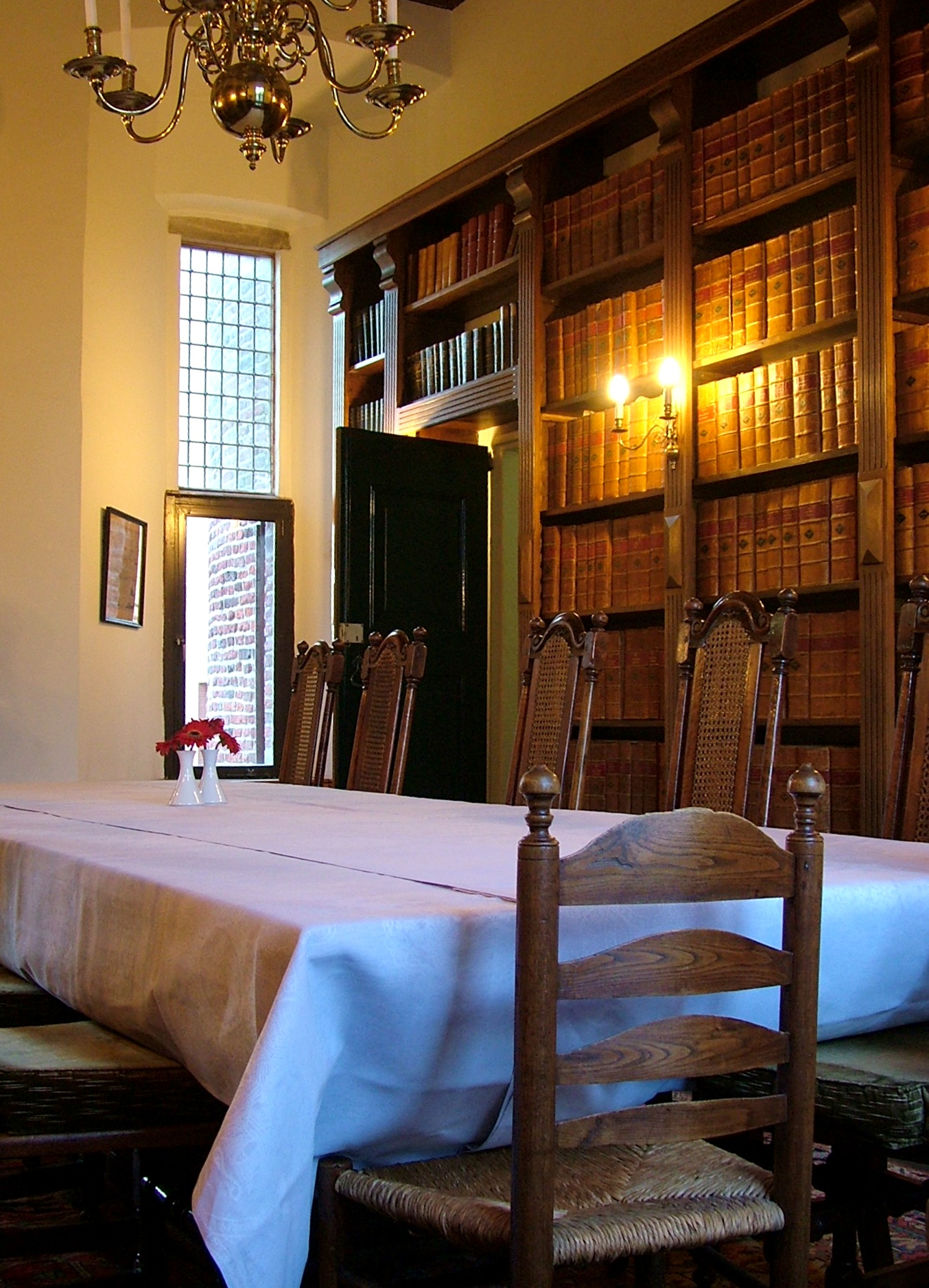 Arnhem: Huis der Provincie. Kamer van Gedeputeerde Staten in de toren.